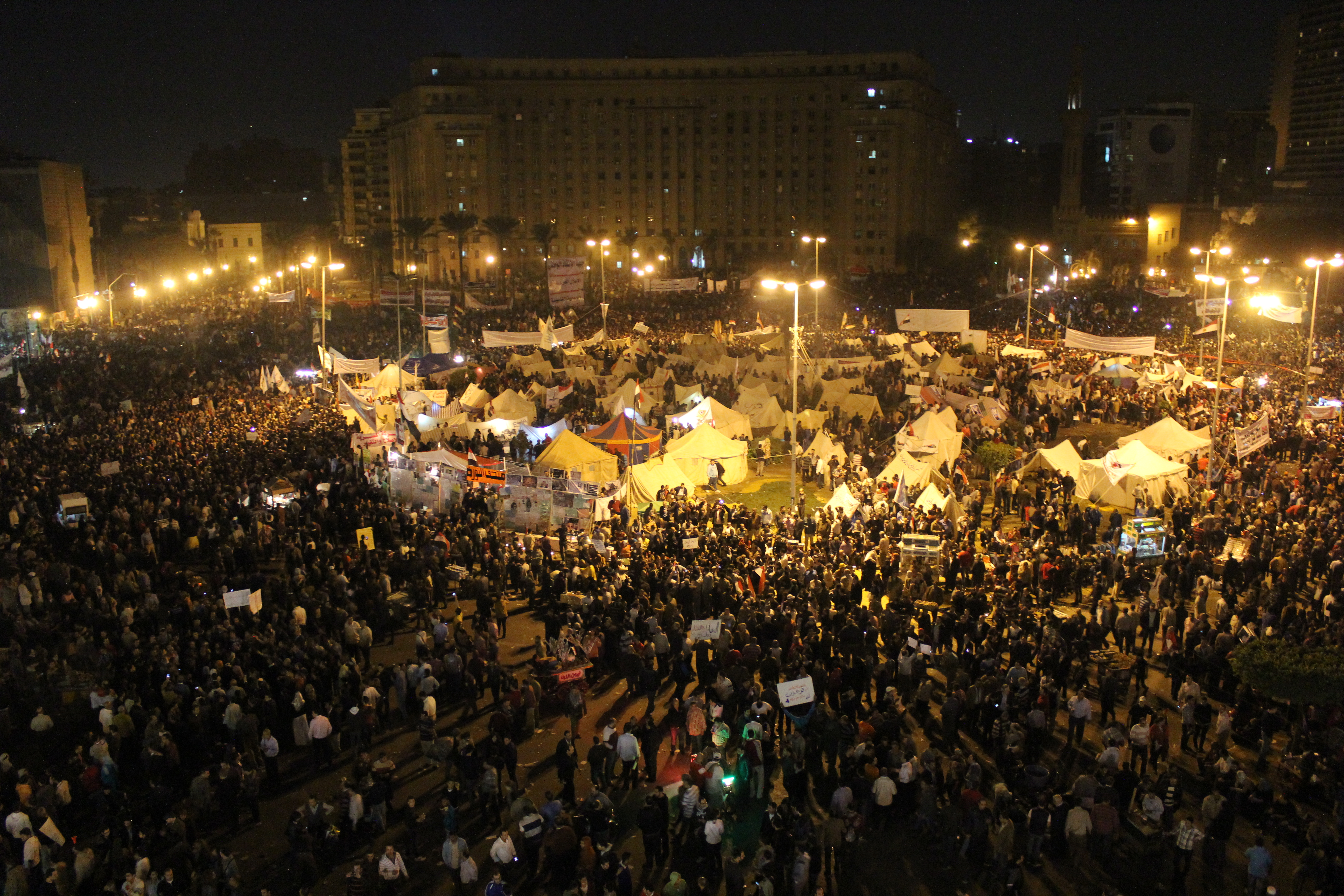 Tahrir 27 Nov 2012 - التحرير ضد مرسي